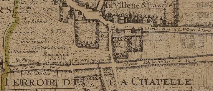 Paris.Inselin.1707.La Chapelle.Croix de l'Evangile